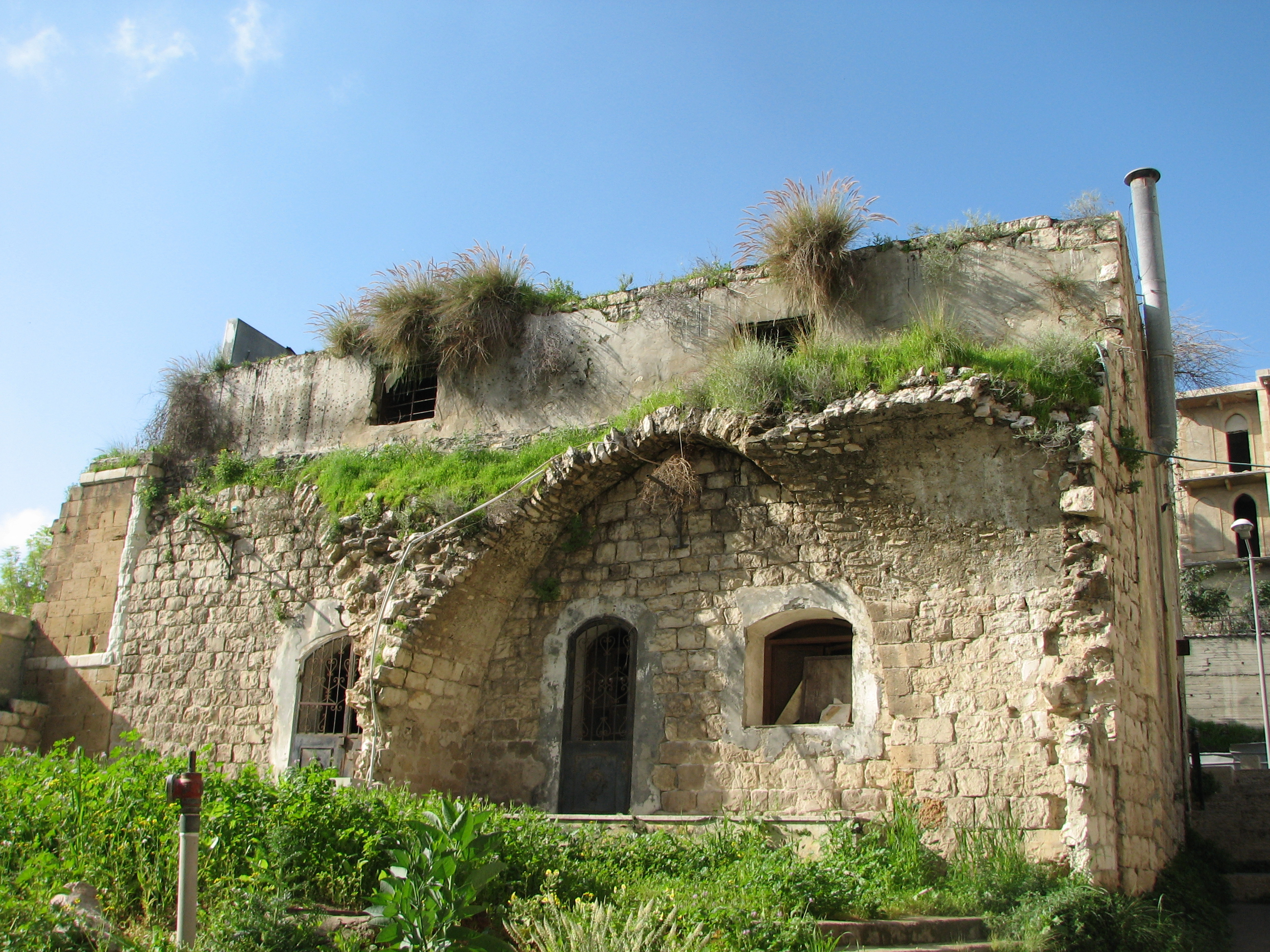 Al Pasha Complex. House & Turkish bath in Downtown Haifa, Israel מתחם אל-פאשה, כולל מבנה של בית מרחץ טורקי מהמאה התשעה עשרה ובית משפחת אל-ח'ליל ששניים מבניה היו ראשי עיריית חיפה . שרידי מבנים מדרום לבית אל פאשה